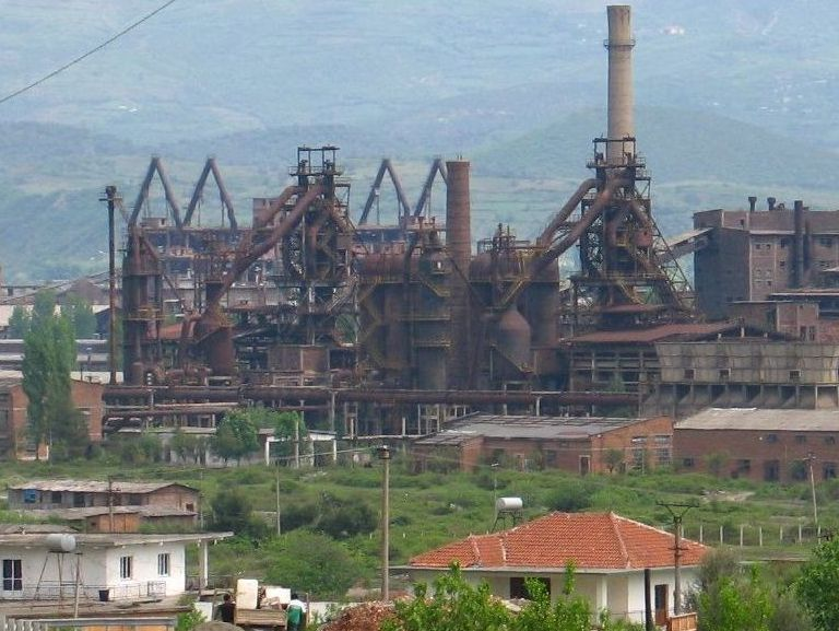 Доменні печі металургійного комбінату "Сталь Партії" у Албанії.